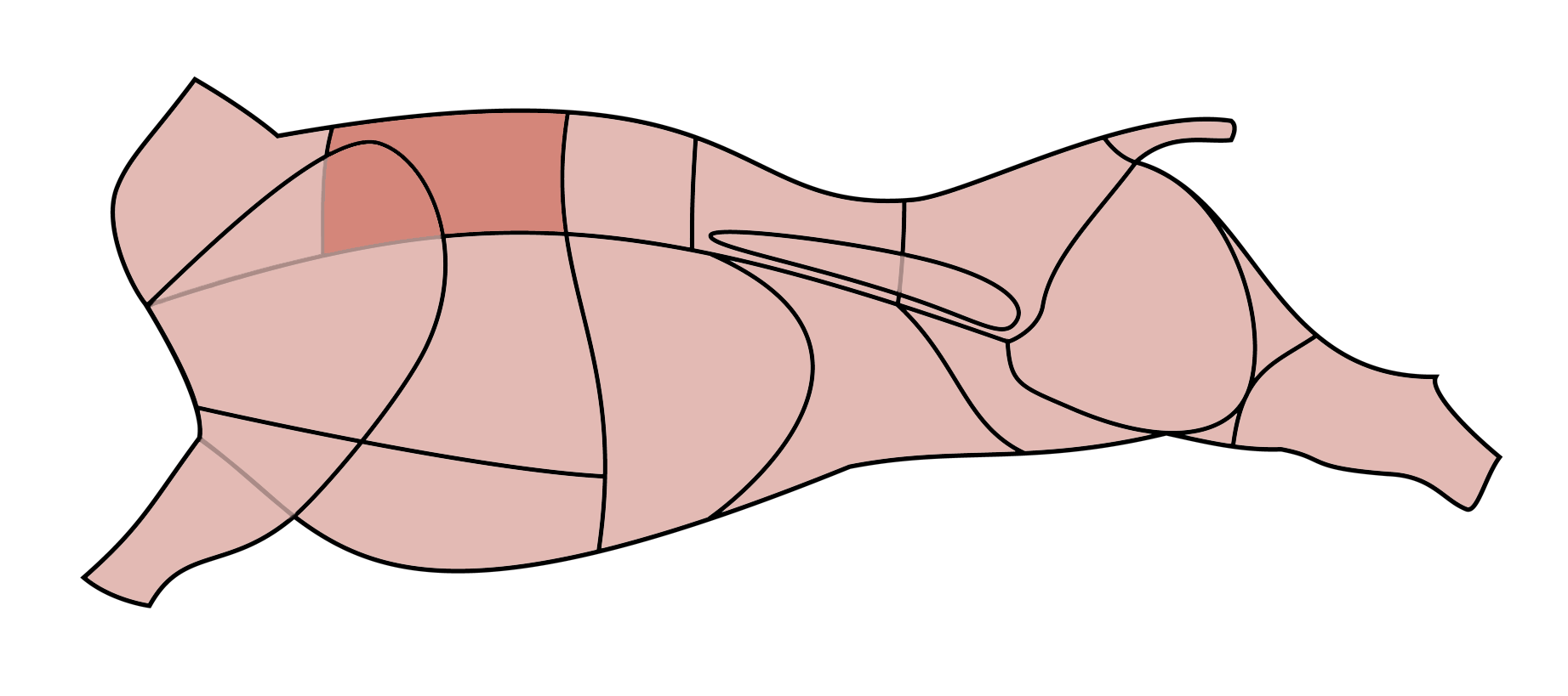 Rindernacken.